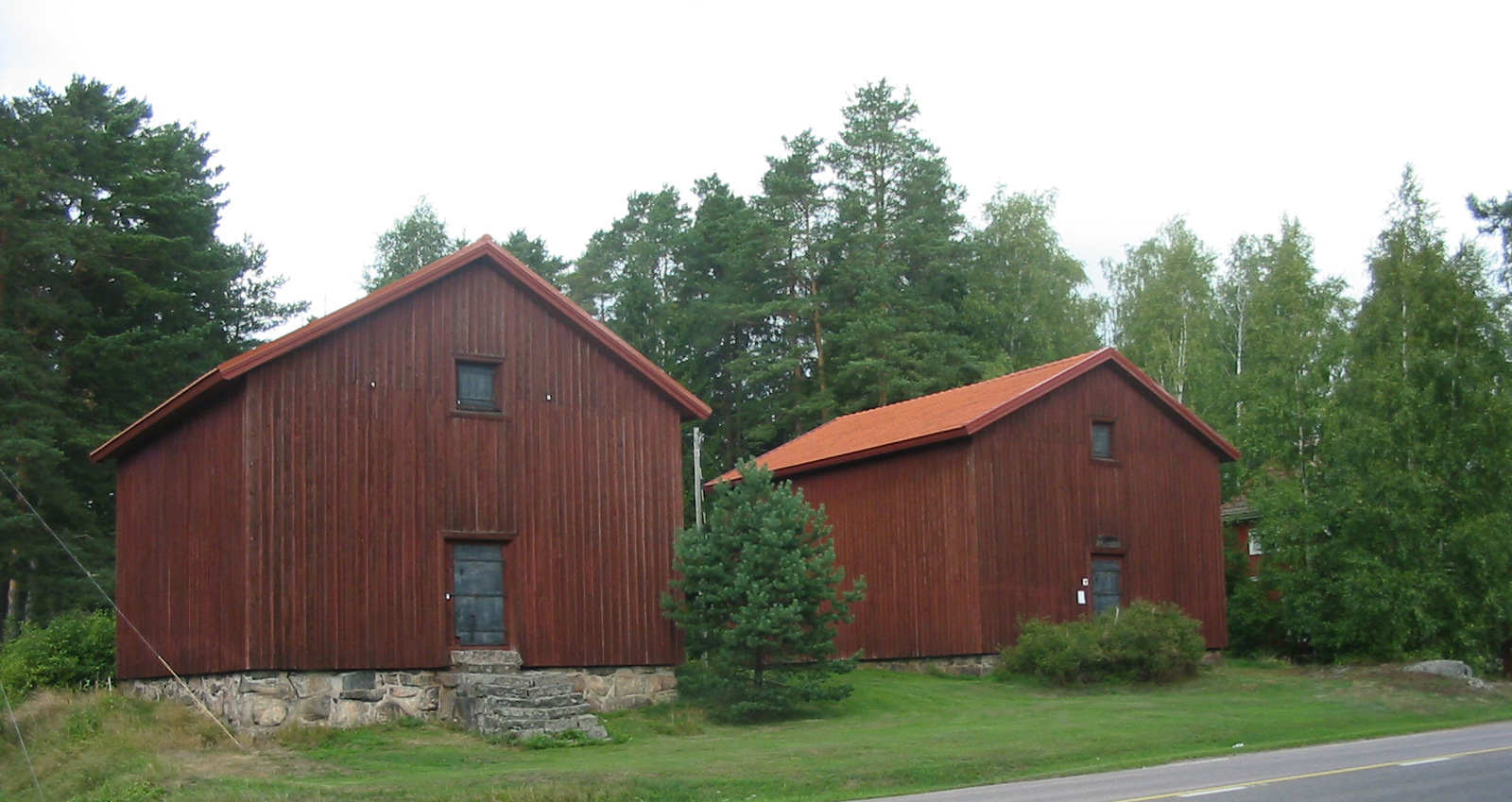 Marttilan kotiseutumuseo vanhoissa lainamakasiineissa Hämeen Härkätien varrella